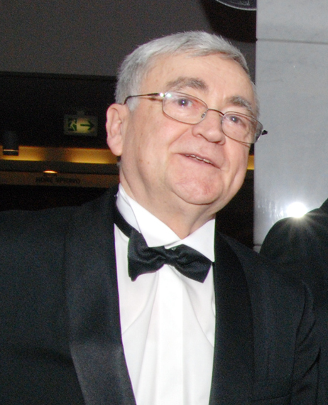 Stanislav Štepka